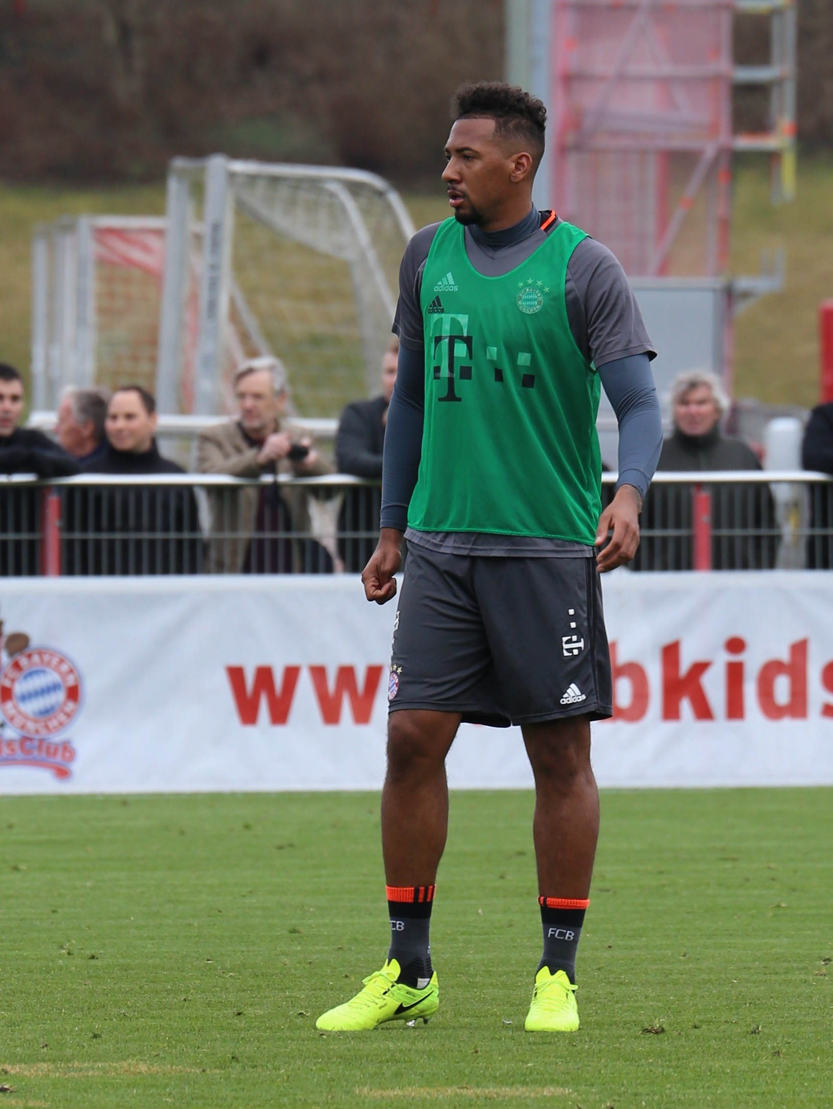 Jérôme Boateng, am 14. März 2017 beim Training auf dem Gelände des FC Bayern München